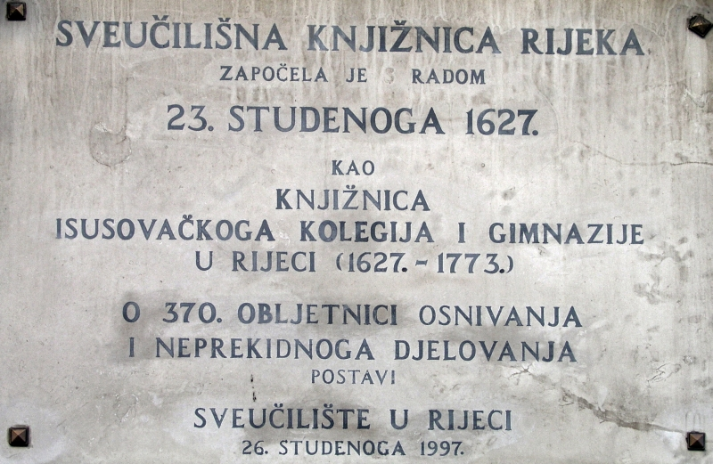 spomen ploča na Sveučilišnoj knjižnici i Muzej suvremene umjetnosti u Rijeci, Hrvatska